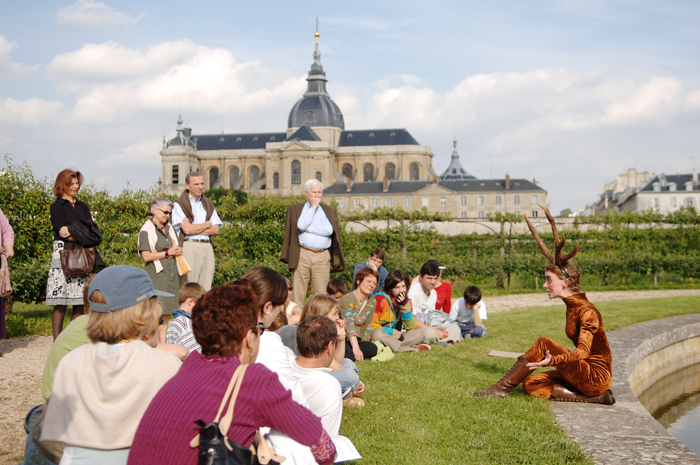 Les Fables de La Fontaine (compagnie Phénomènes et Cie) au festival Le Mois Molière en juin 2006.